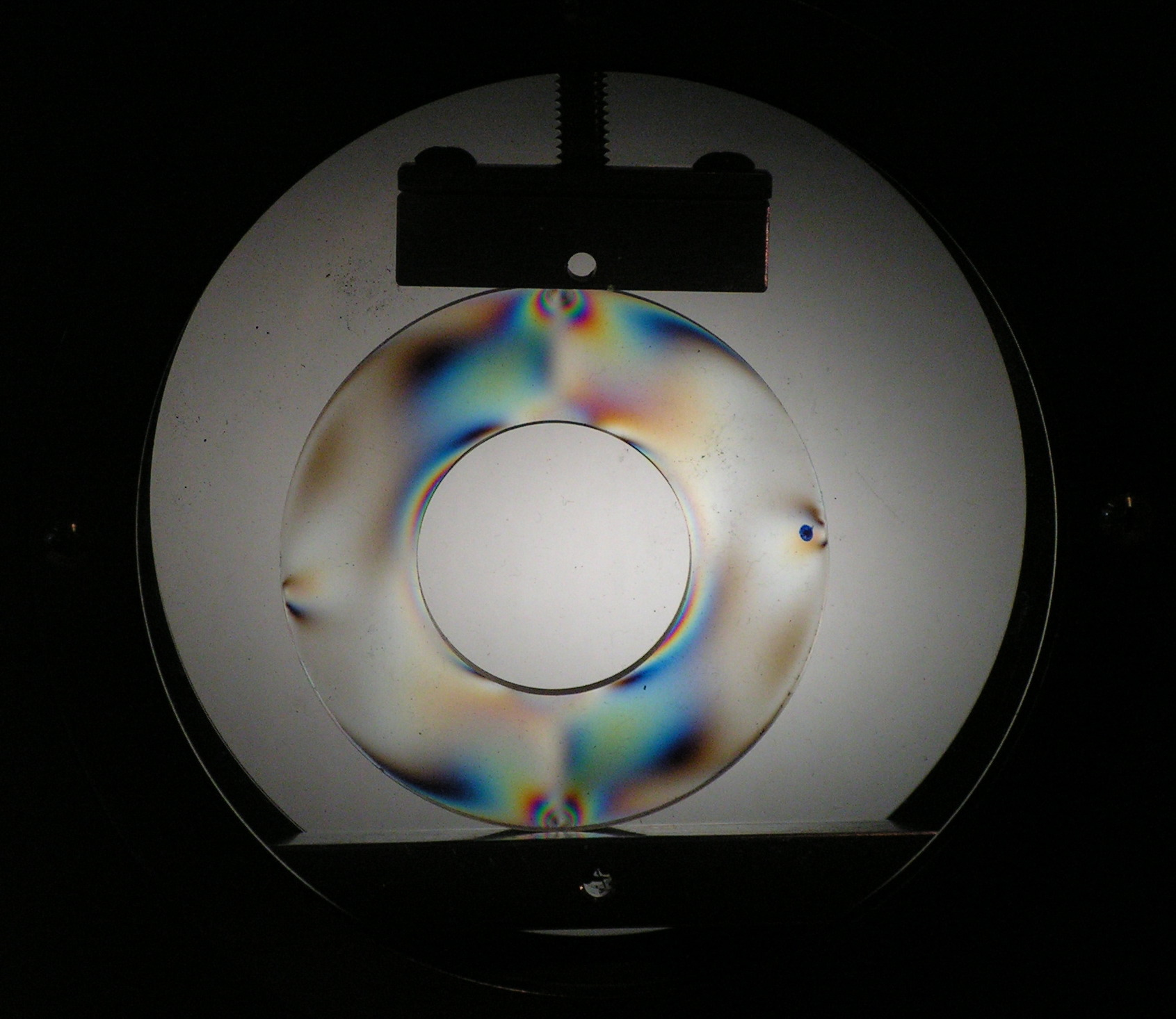 Sous l'effet d'une contrainte extérieure, ce matériau devient biréfringent.